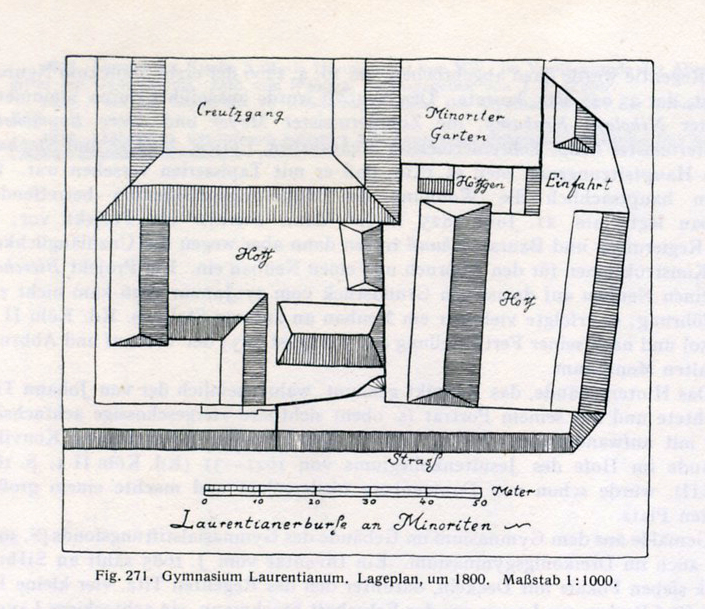 Köln, Lageplan des ehemaligen Gymn. Lauretianum (um 1800)